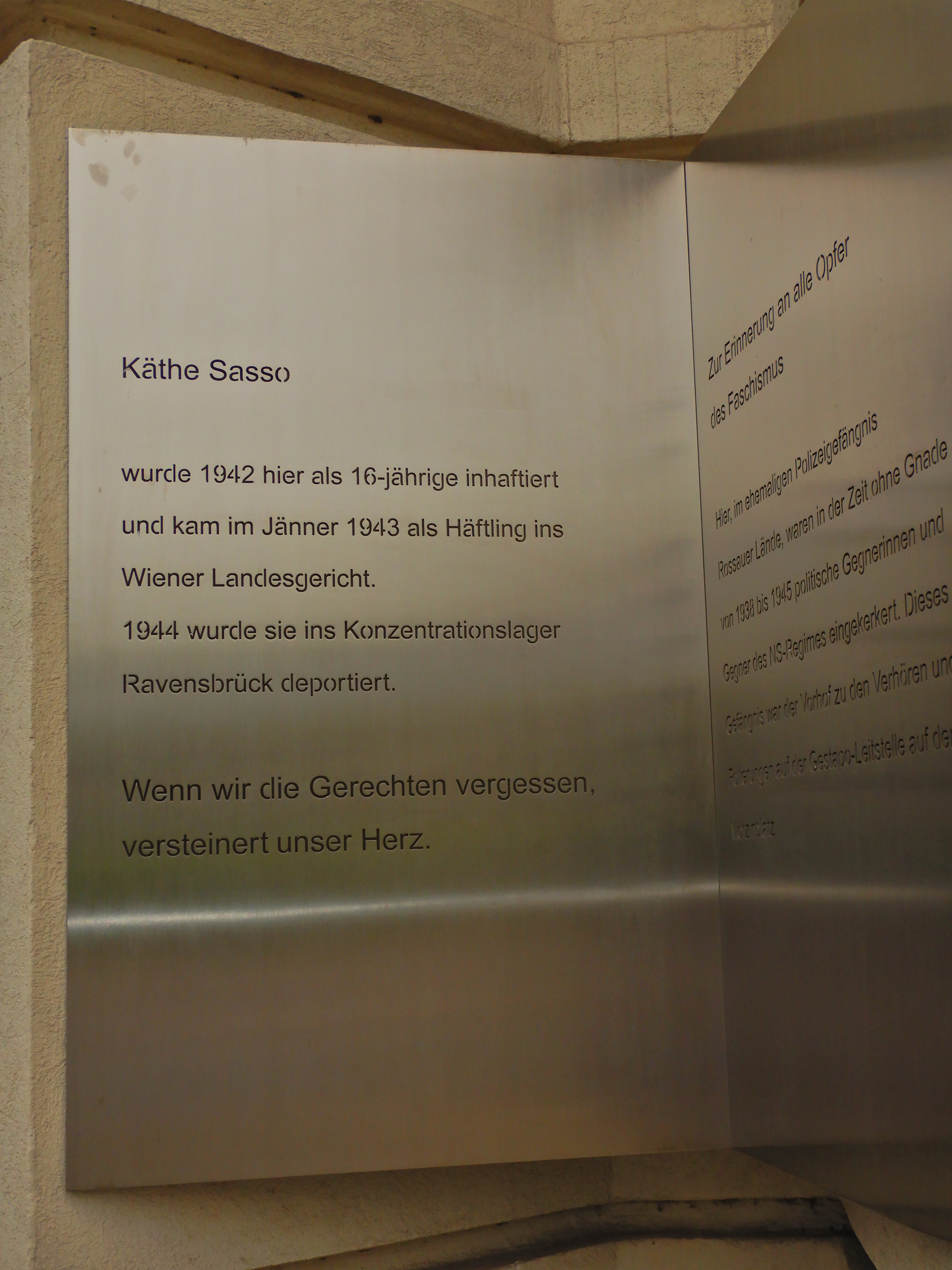 Gedenktafel für NS-Opfer (Wien, Berggasse 43, Käthe Sasso)